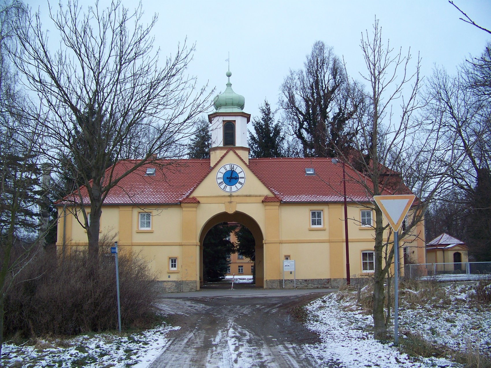 Schloss Lipsa This is the photograph of an architectural monument. It is part of the list of cultural monuments of Lipsa, no. 09120226